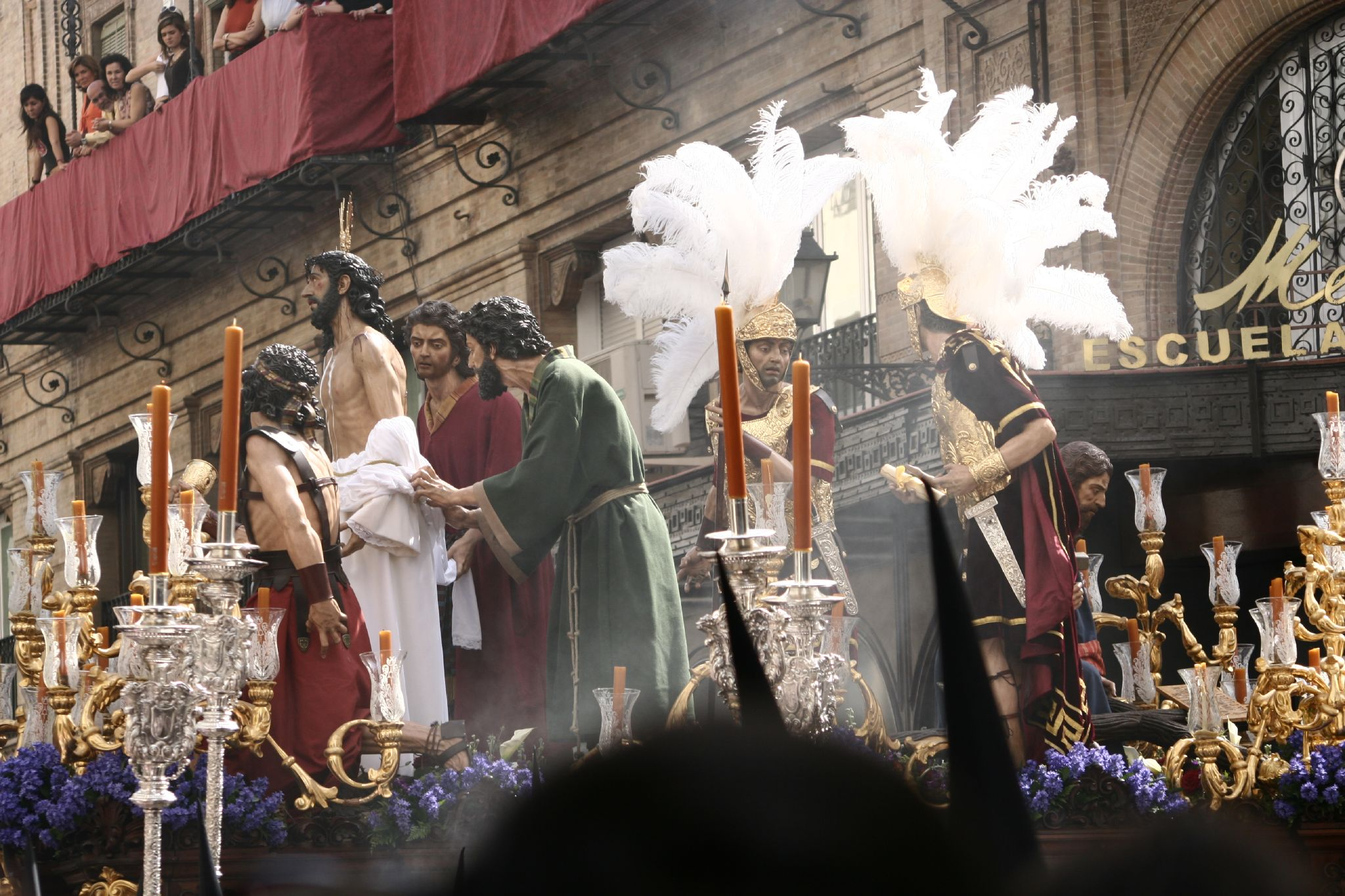 Jesús Despojado. Semana Santa en Sevilla. Año 2006 Foto realizada y propiedad de Ángel Chacón